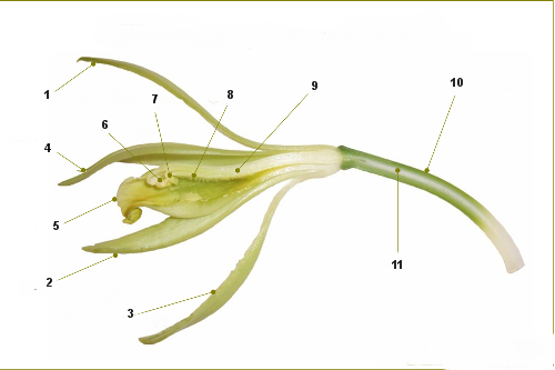 Vanilla planifolia, longitudonal section. Details: 1:bovenste sepaal; 2: rechtse sepaal; 3: linkse sepaal; 4: rechtse petaal; 5: lip; 6: Pollinia; 7: rostellum; 8: stigma; 9: gynostemium; 10:ovarium; 11:ovula